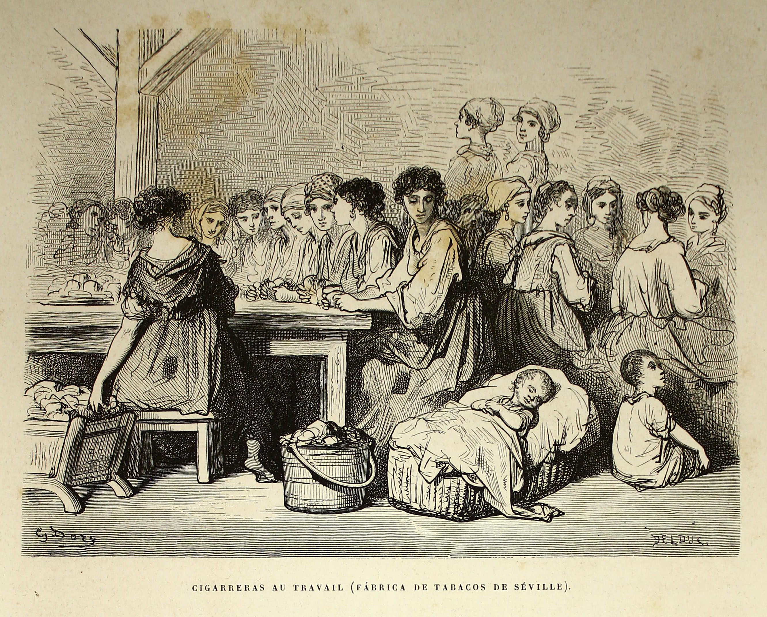 Autor: Davillier, Jean Charles, barón, 1823-1883 Descripción bibliográfica: L'Espagne / par Le Baron CH. Davillier ; ilustrée de 309 gravures dessinées su bois par Gustave Doré. - Paris : Librairie Hachette, 1874. - 799 p. : il. Materia: España- Geografía Materia: España- Usos y costumbres Ilustrador: Doré, Gustave, 1832-1883 Editor: Libreria Hachette Lugar de impresión: Francia, París Localización: Libro completo